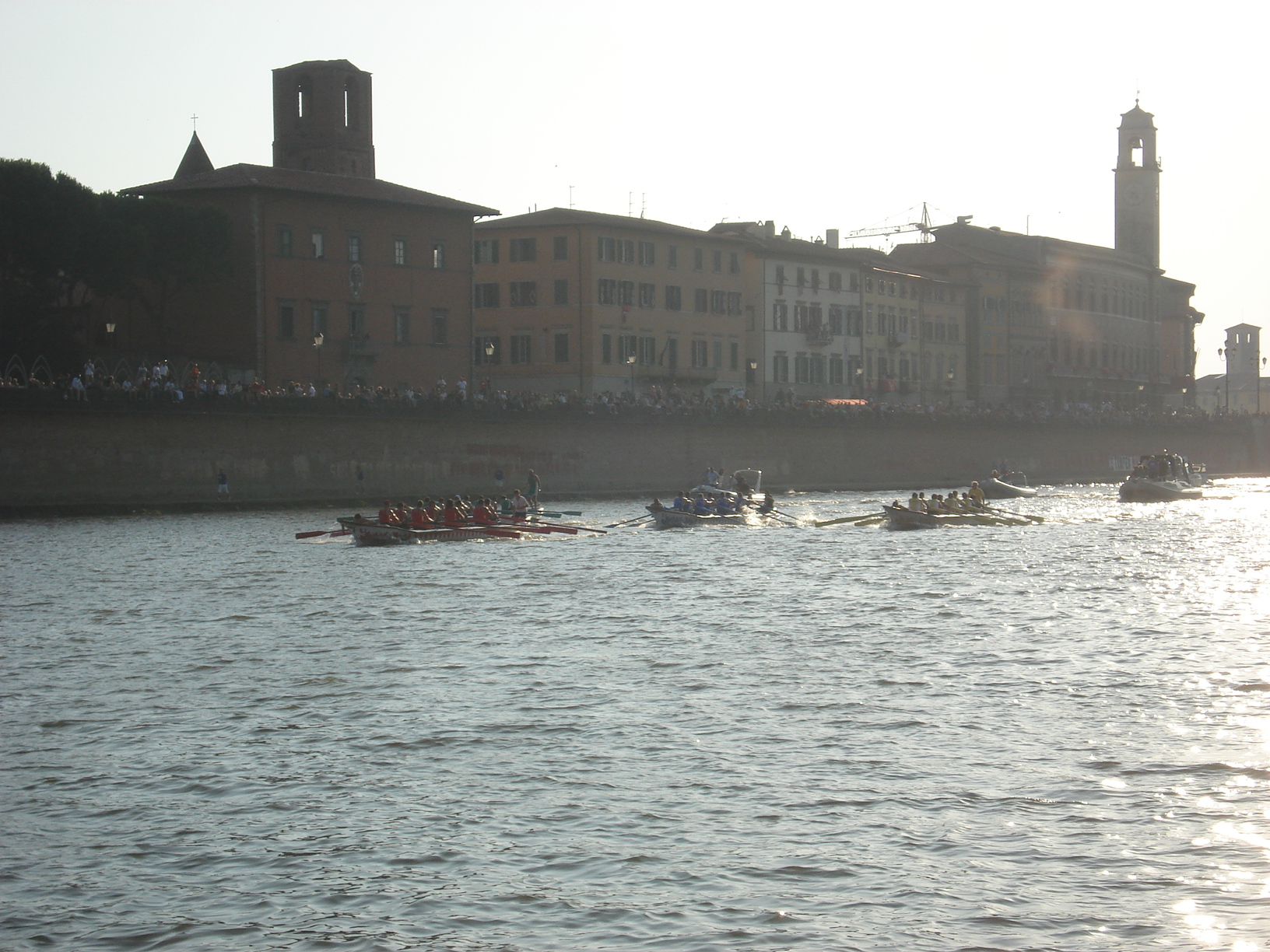 Immagine della regata durante il Palio di San Ranieri a Pisa.